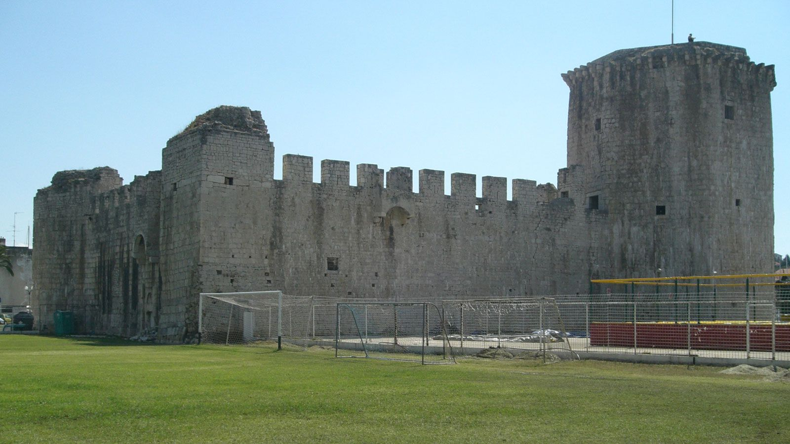 Trogir: Kula Kamerlengo i igralište Batarija